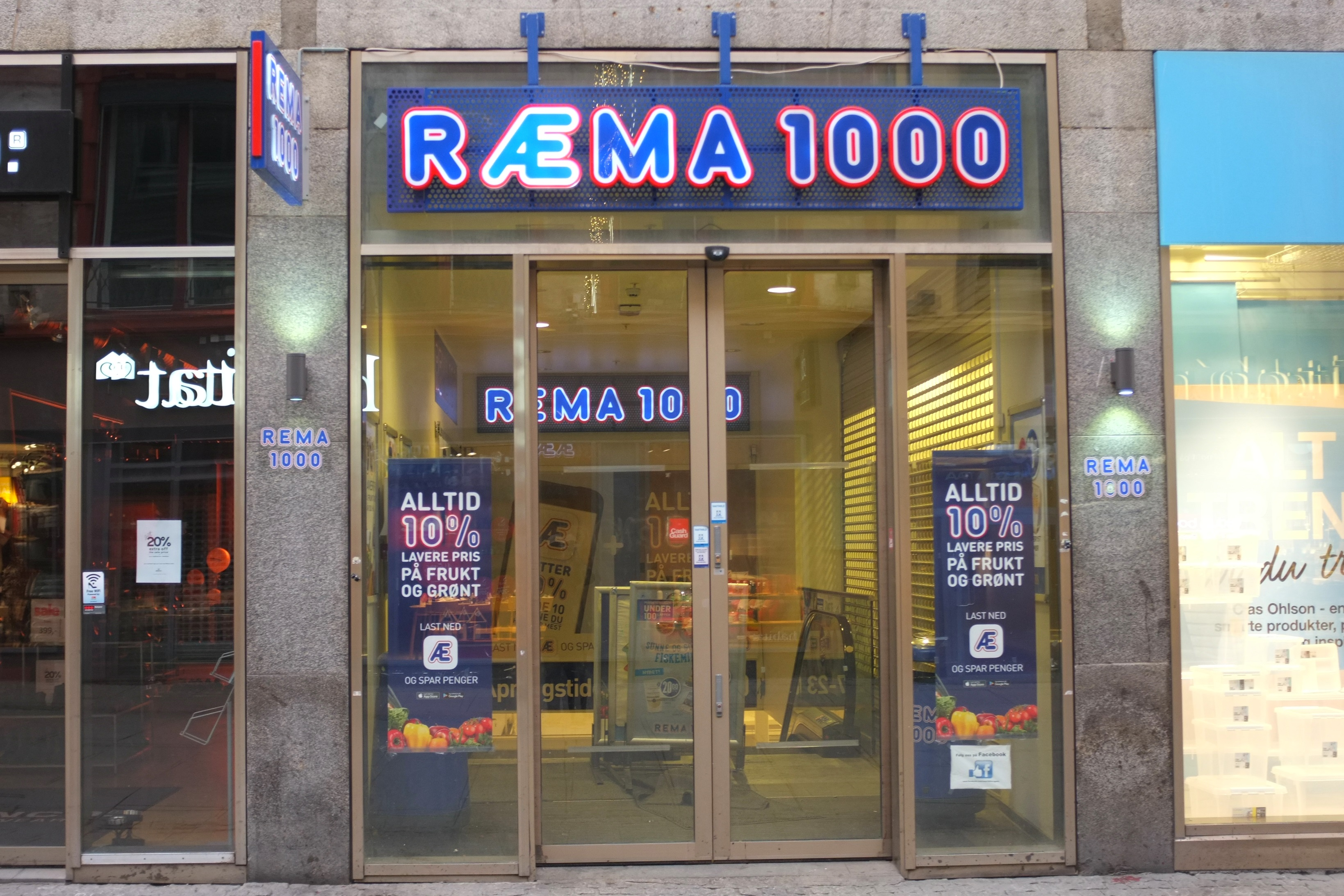 Rema 1000 i Torggata i Oslo, under 'Æ'-kampanjen i 2017.